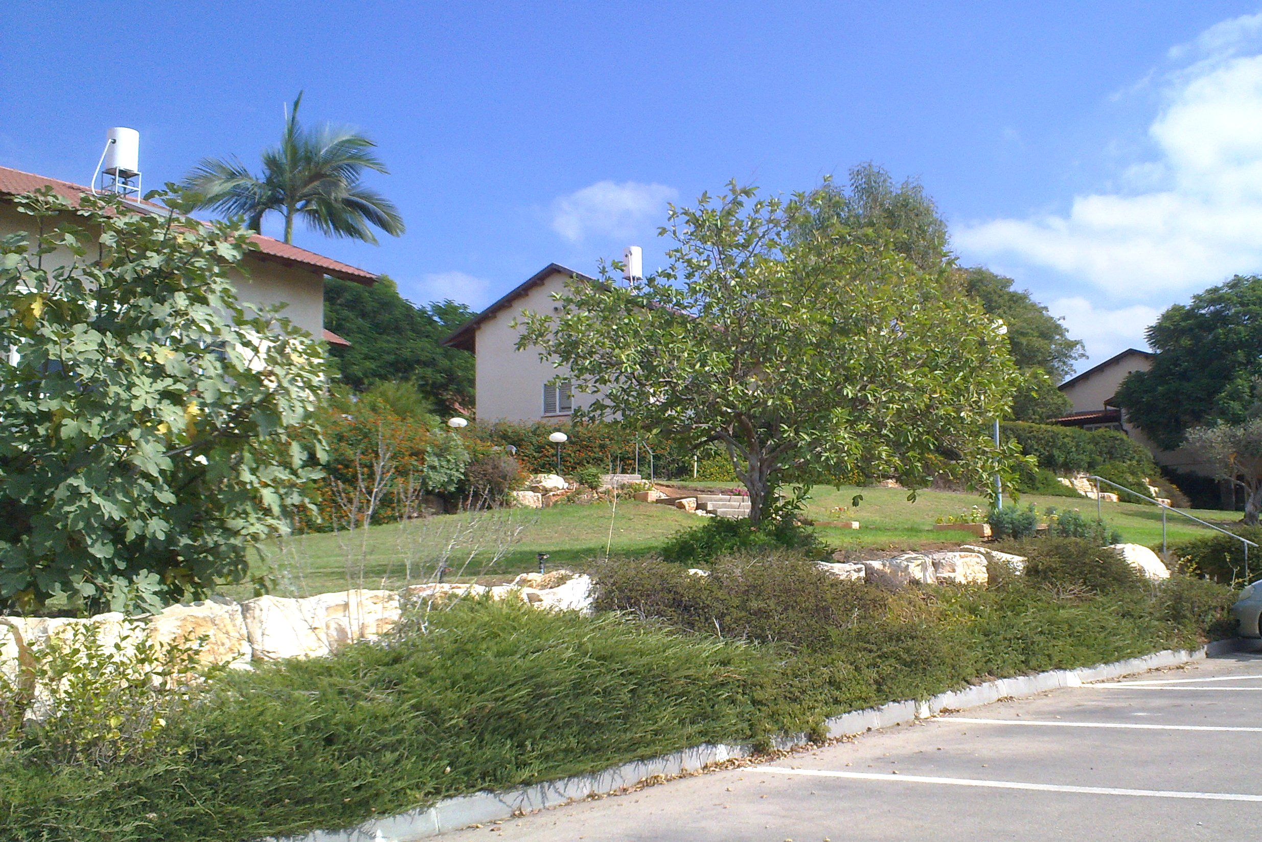 Kibutz Magal בקיבוץ